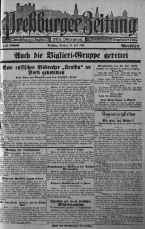 Titulný list bratislavských Pressburger Zeitung z r. 1928.